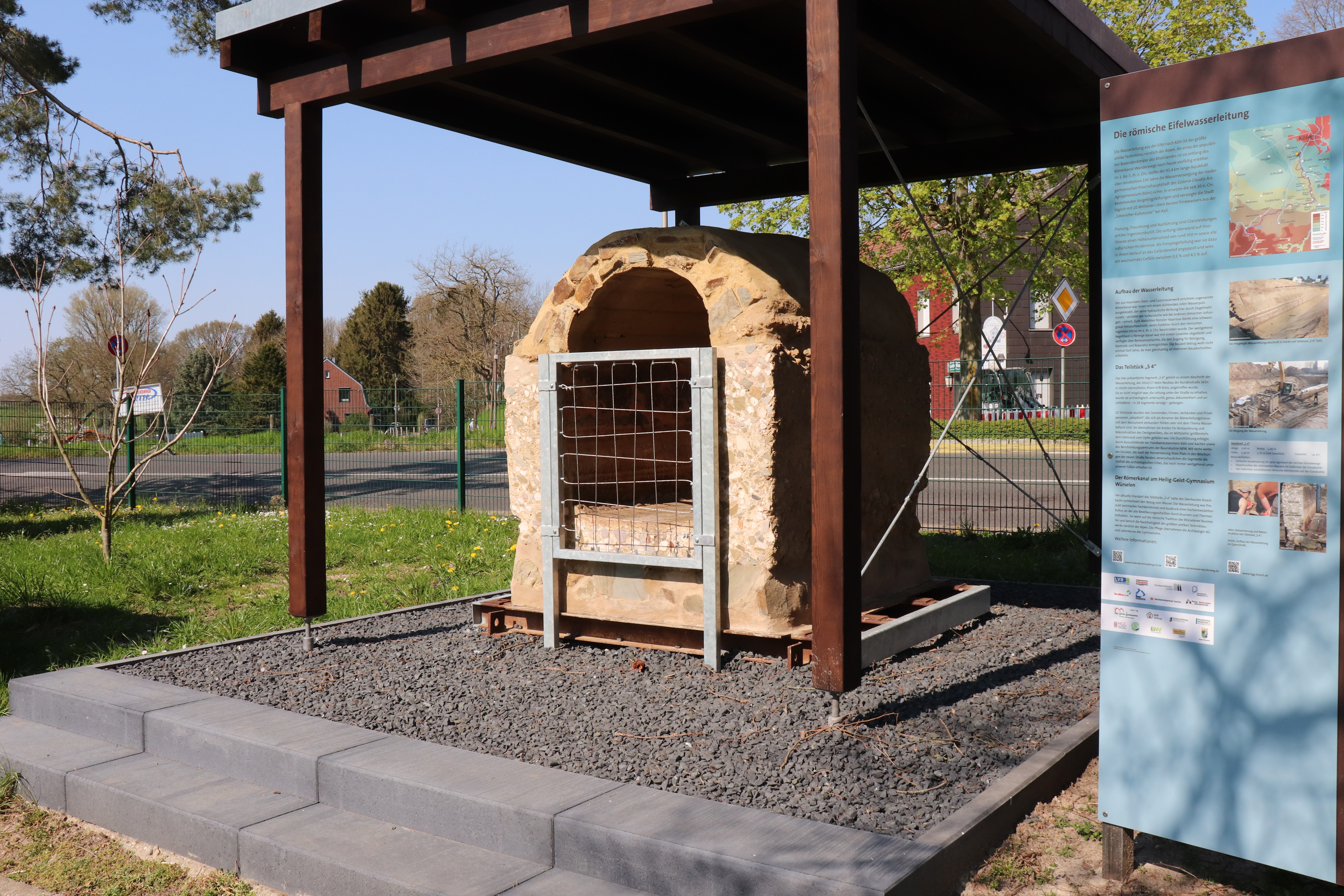 Das Römerkanalteilstück auf dem Schulgelände des HGG.